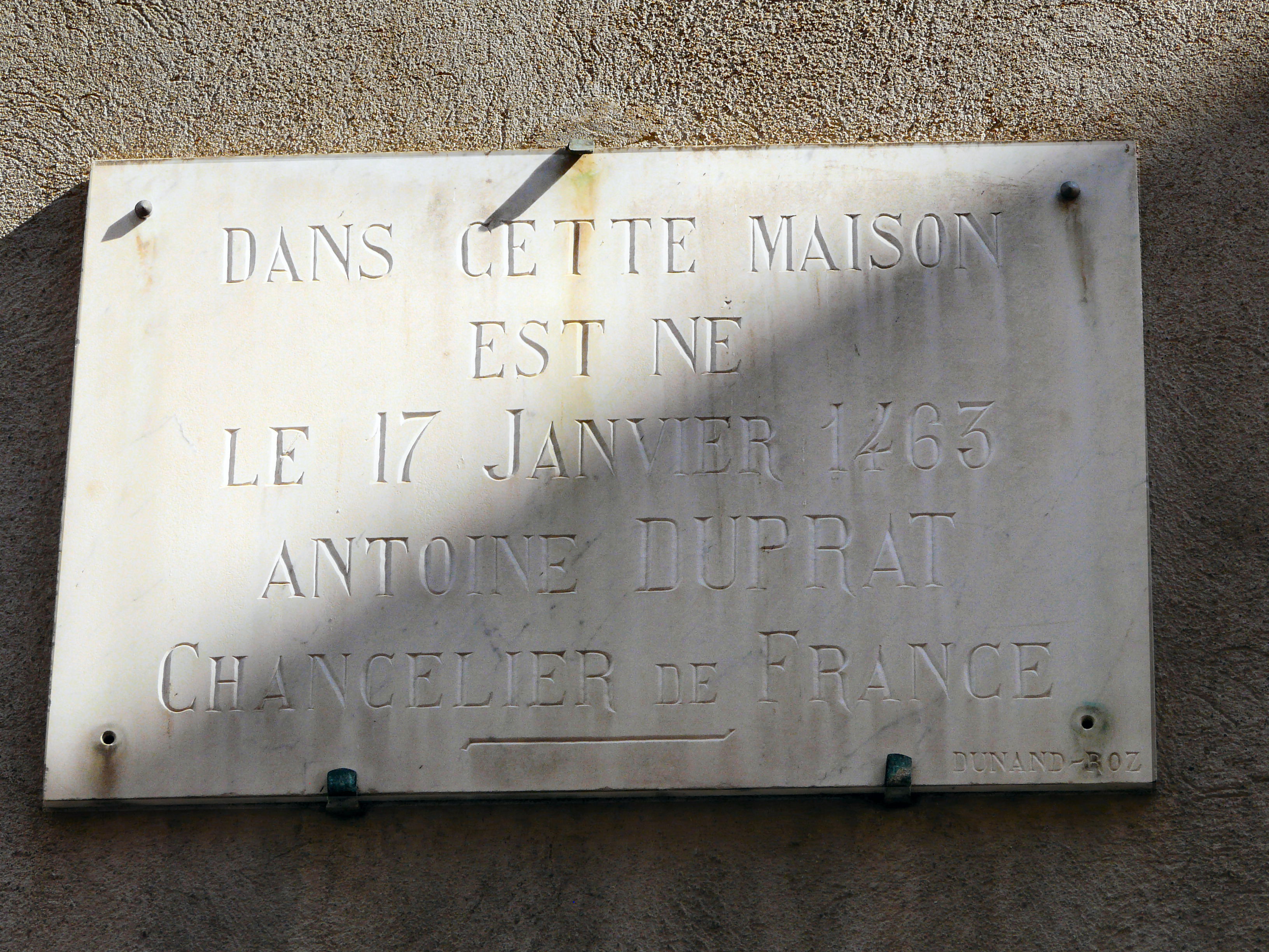 Plaque apposée sur la façade de l'hôtel Duprat, Issoire, Puy-de-Dôme, France.